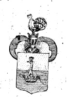 Wappen Familie Freiherrn von Klimberg zu Klingenberg (gold und blau geteilt, aus Adelskrone ein nach links blickender Pfauenkopf herauswachsend)